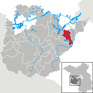 Michendorf in Brandenburg (Country) - District Potsdam-Mittelmark